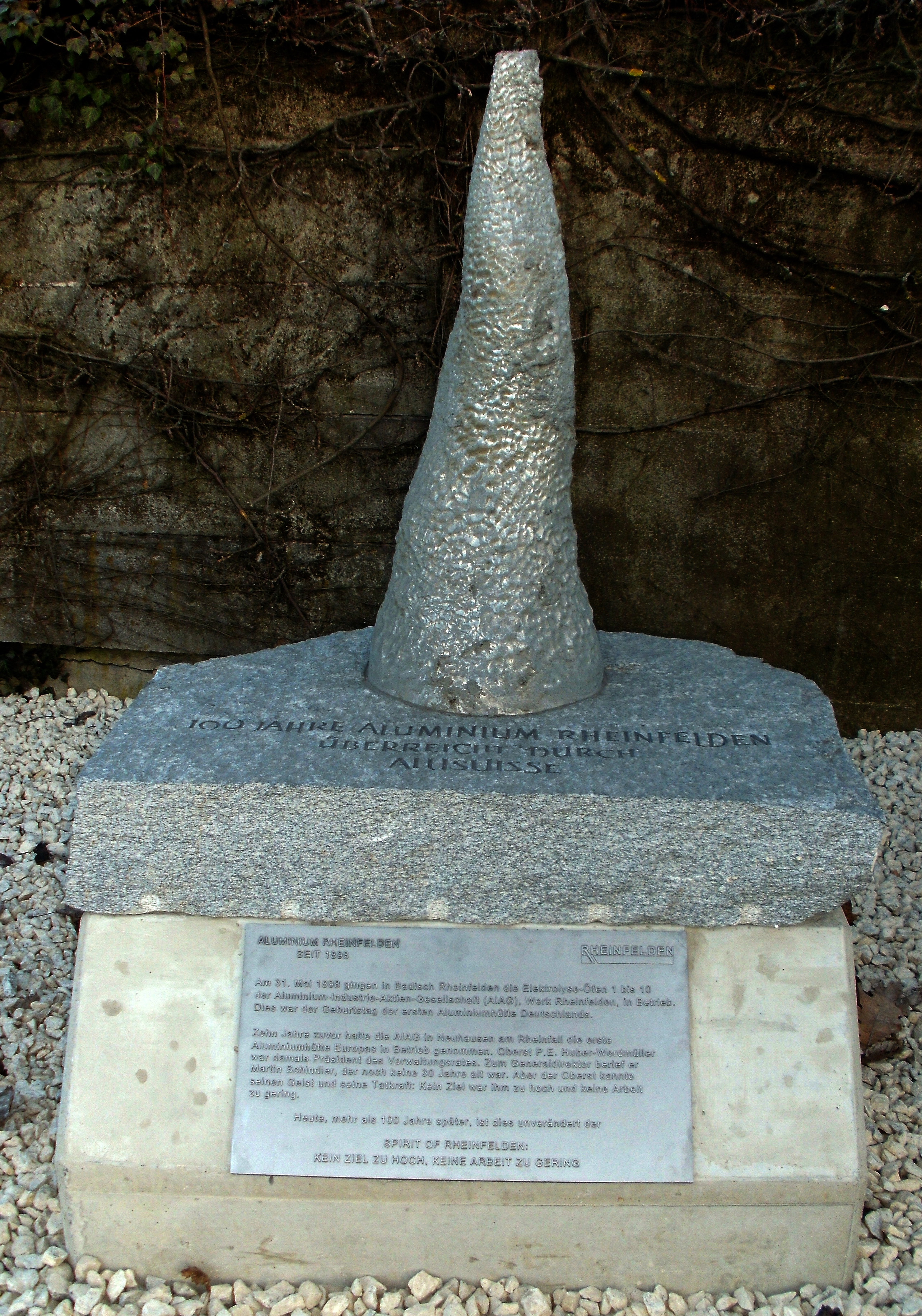 Gedenkstein zum 100jährigen Jubiläum der Aluminium Rheinfelden vor dem Tor von Werk III, gestiftet von der ehemaligen Muttergesellschaft Alusuisse.